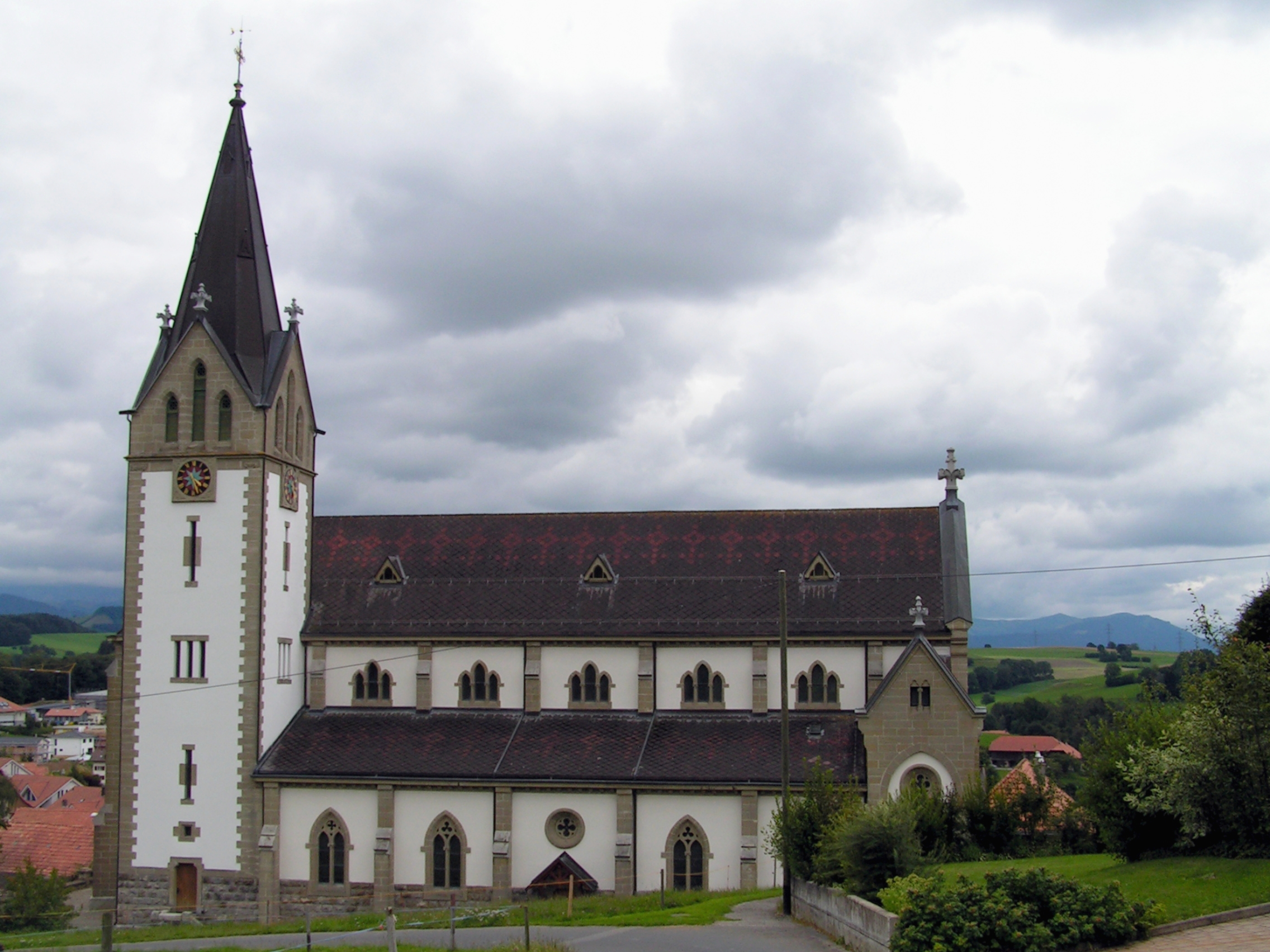 Heitenried. Église Saint-Michel.